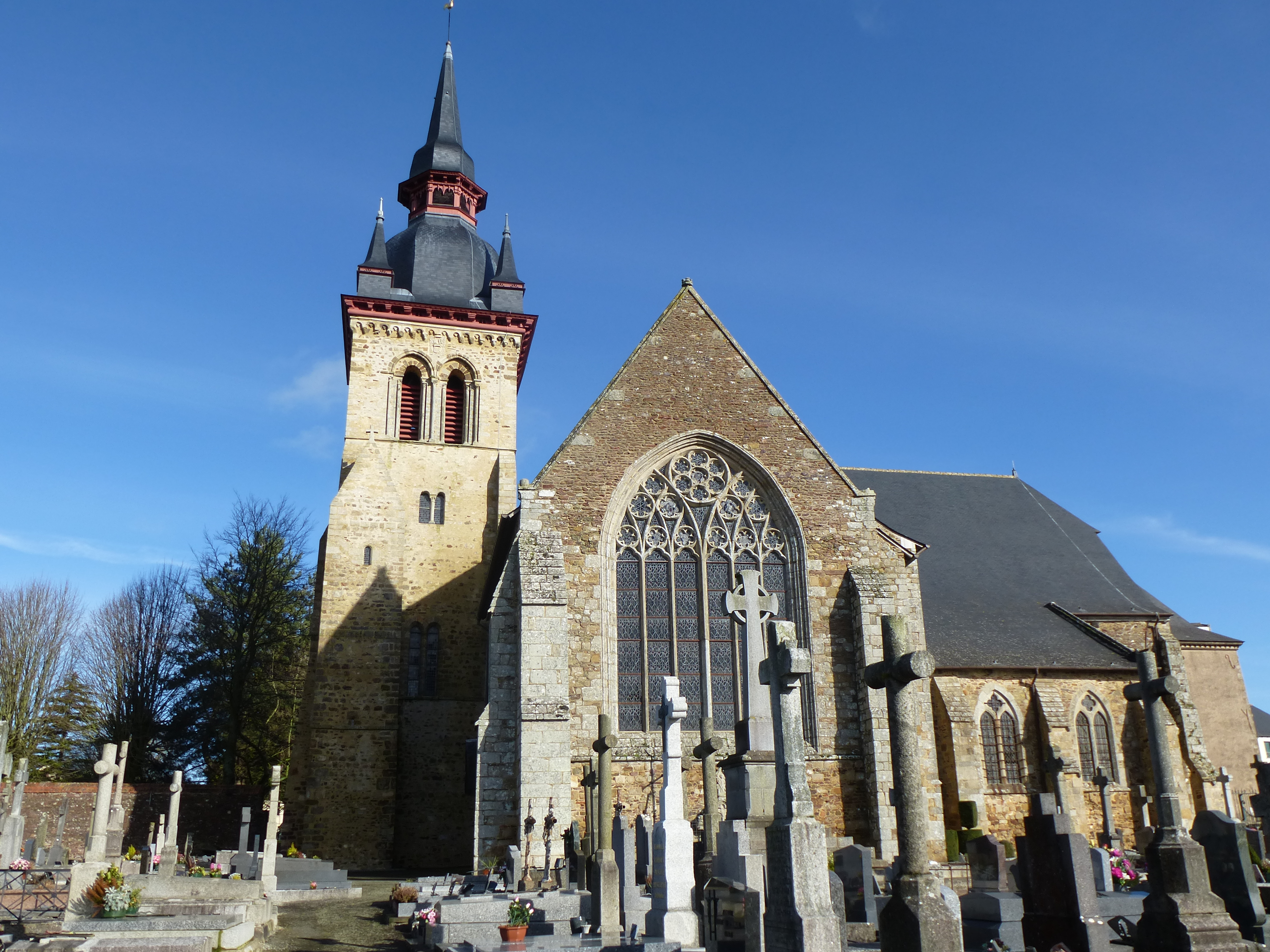 l'eglise de st meen le grand